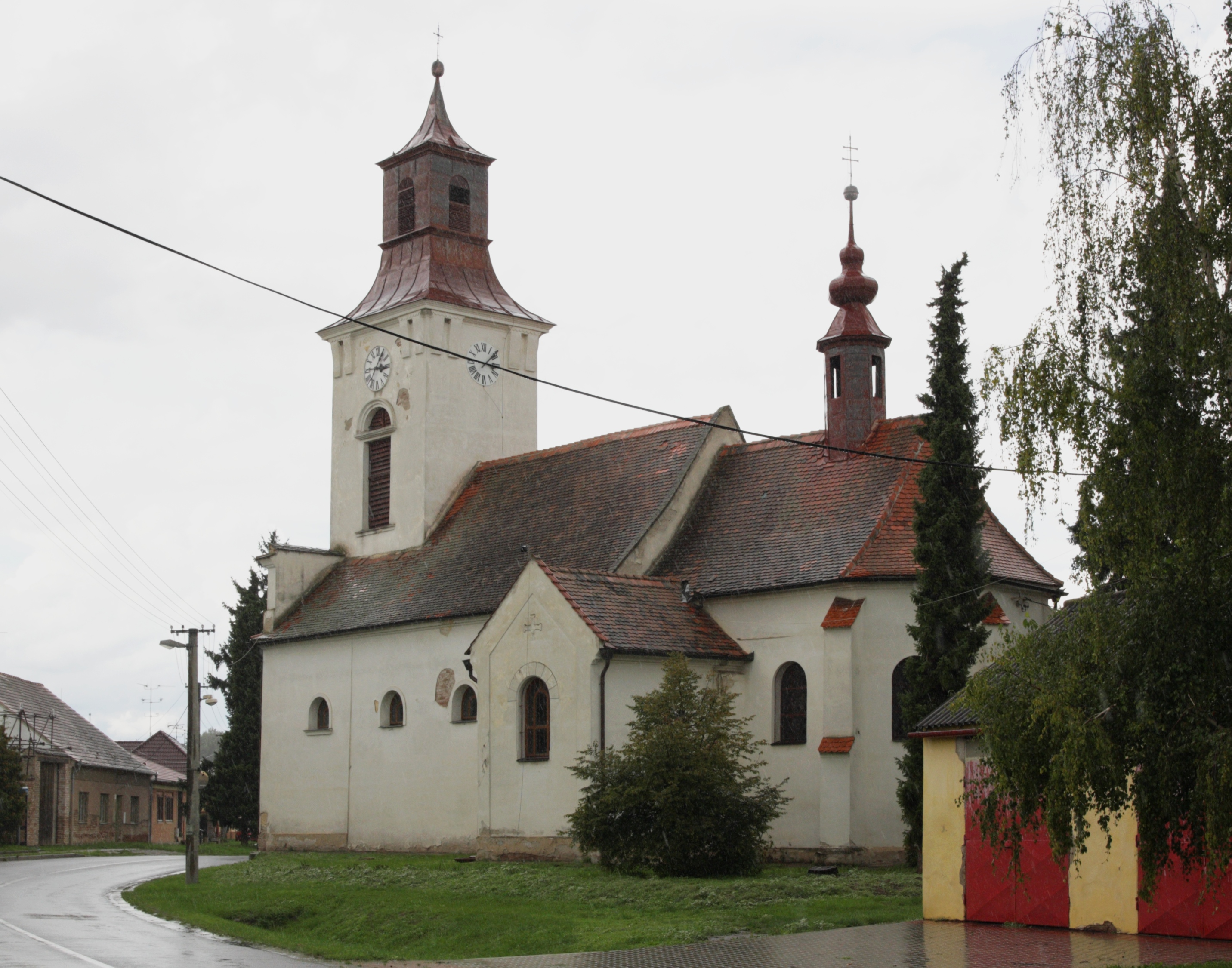 Cvrčovice (okres Brno-venkov) - kostel svatého Jakuba Staršího.